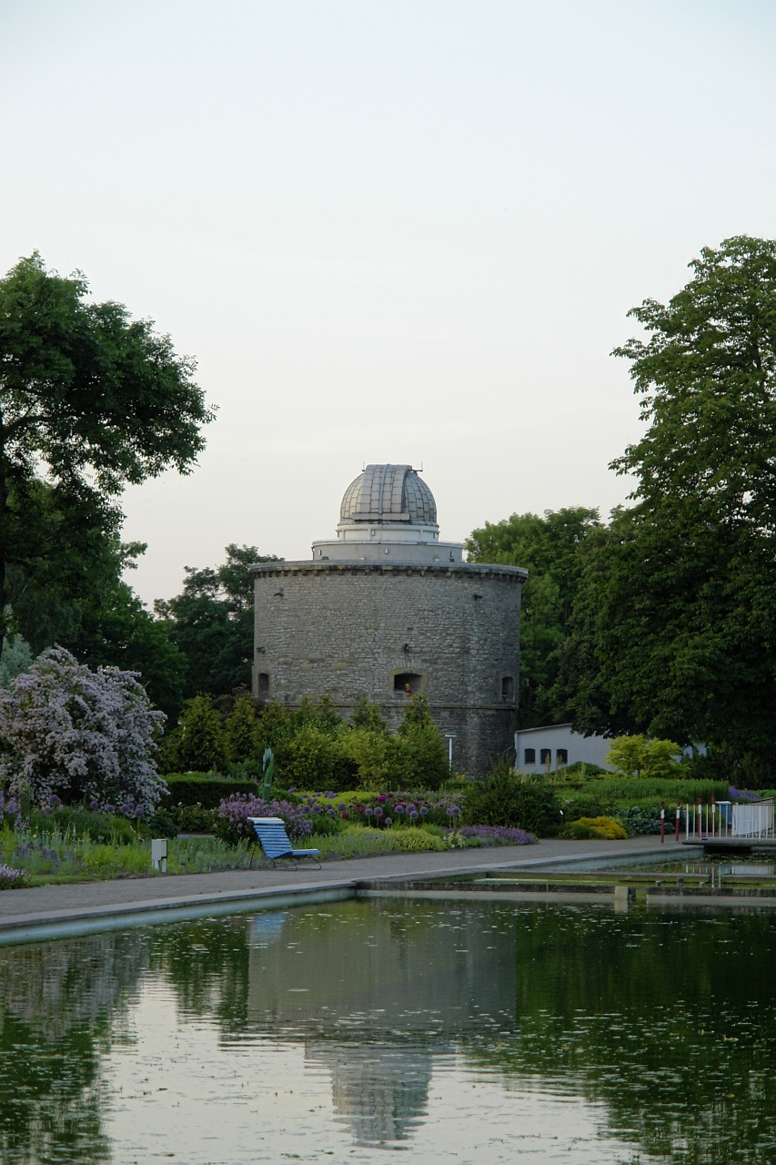 Sternwarte